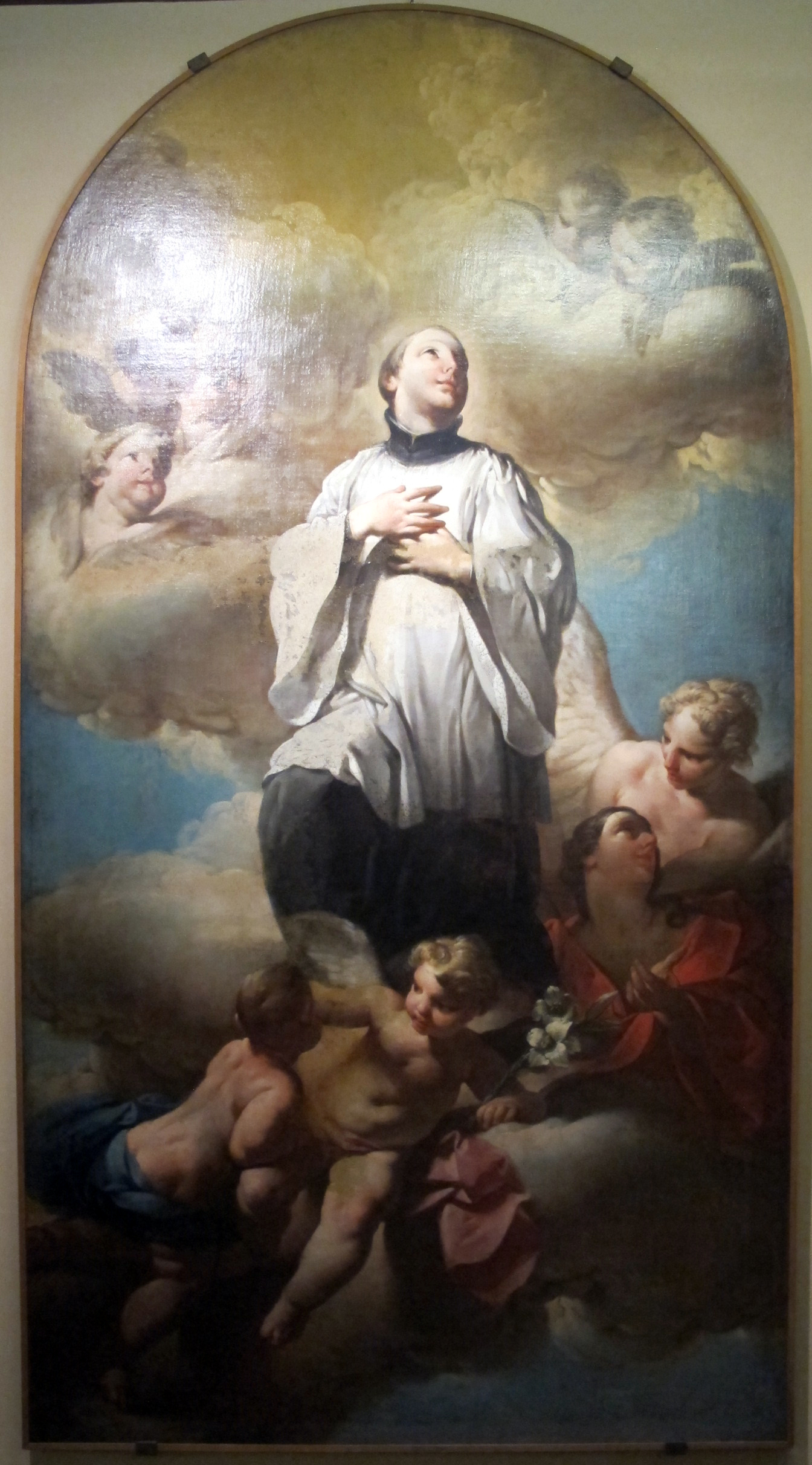 Giovan domenico ferretti, san luigi gonzaga in gloria, 1755 ca.